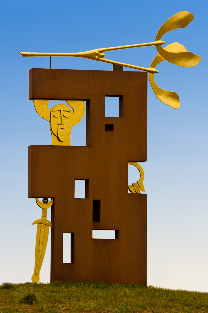 Statue auf dem Keltenkreisel (Künstler: Axel Gallun, 2010)- Zufahrt zur Keltenwelt am Glauberg am Glauberg, Wetteraukreis in Deutschland